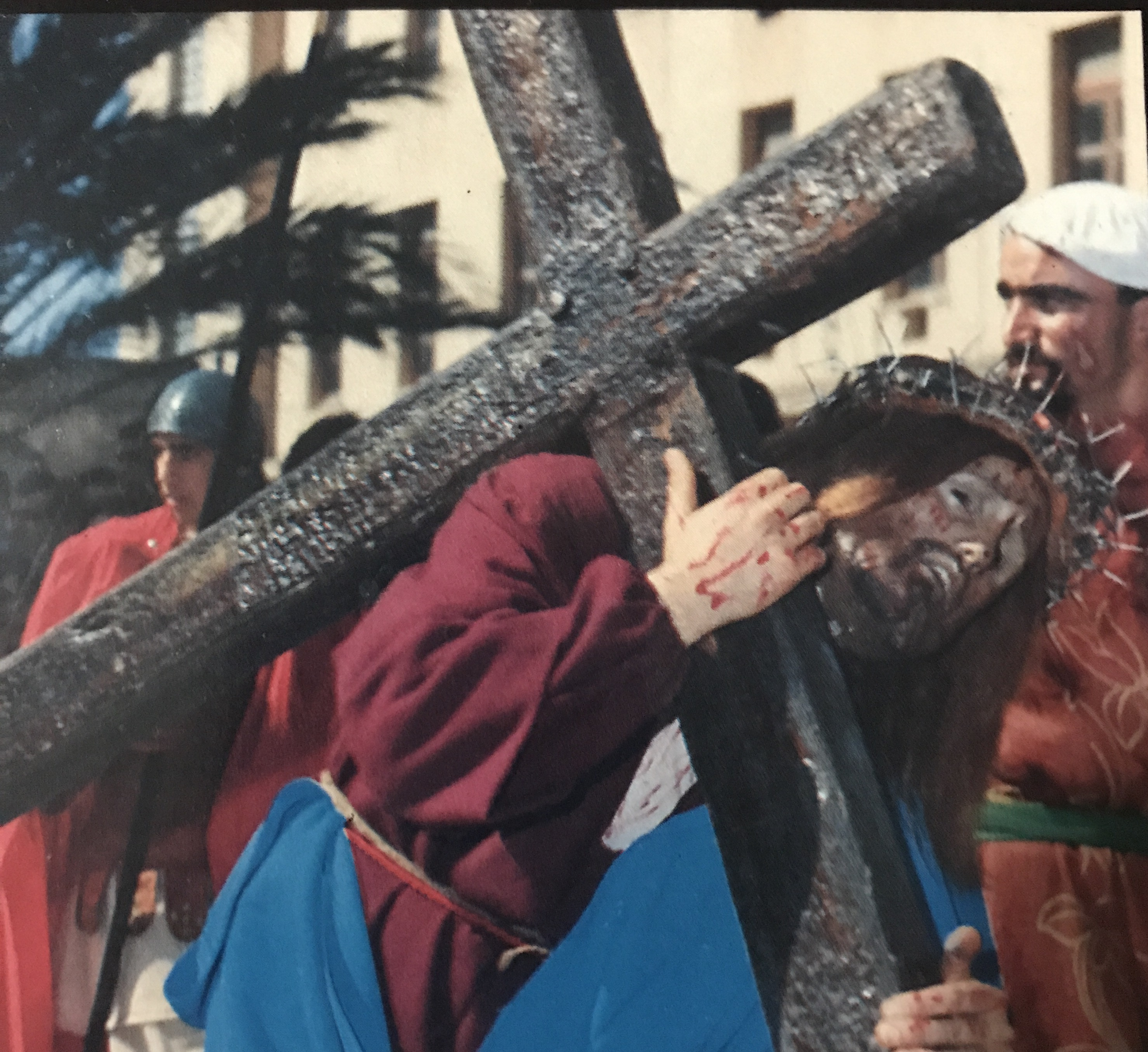 Immagine della processione del Giovedì Santo che viene svolta annualmente a Marsala